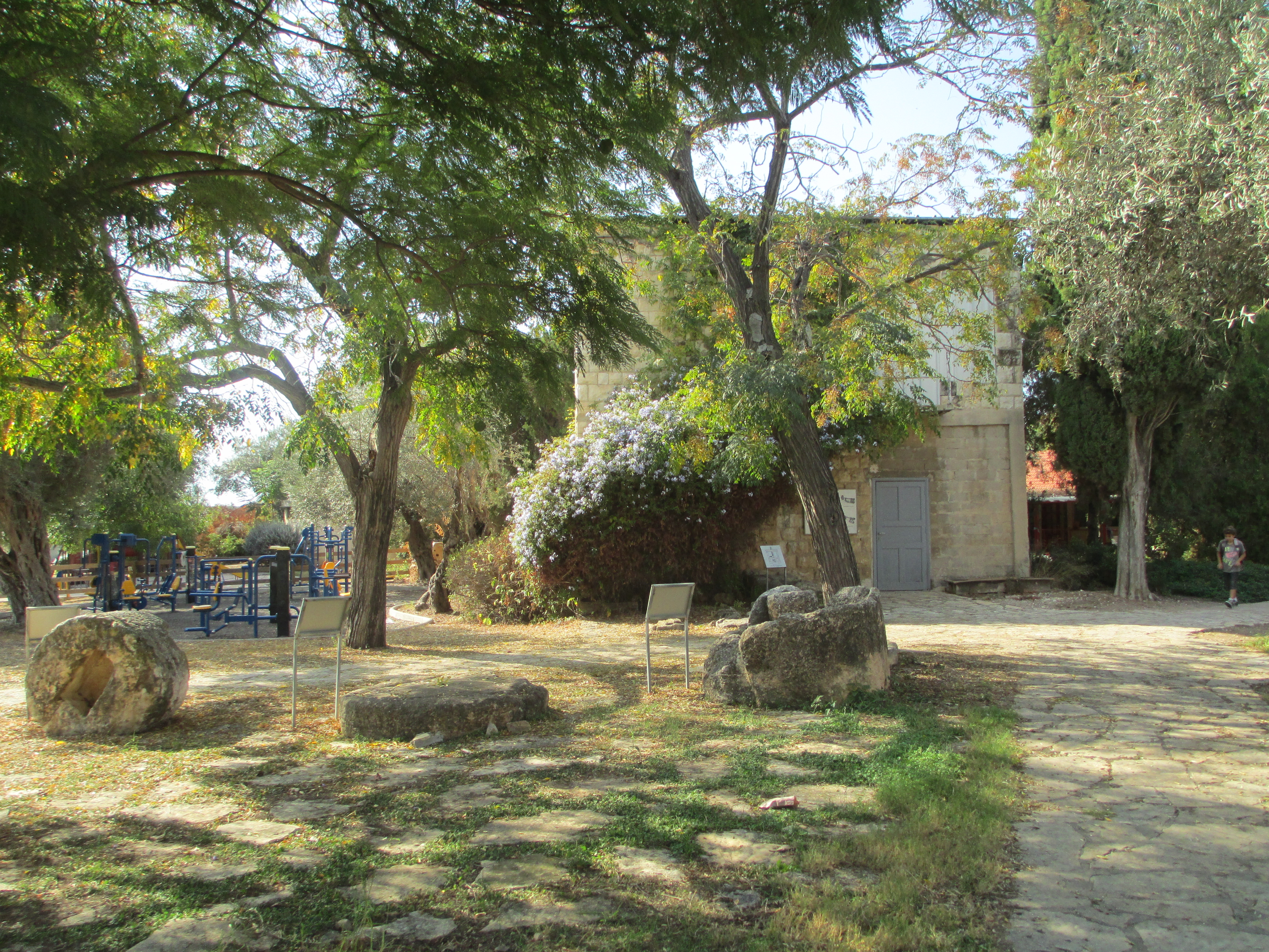 גן ארכאולוגי בקיבוץ בית העמק